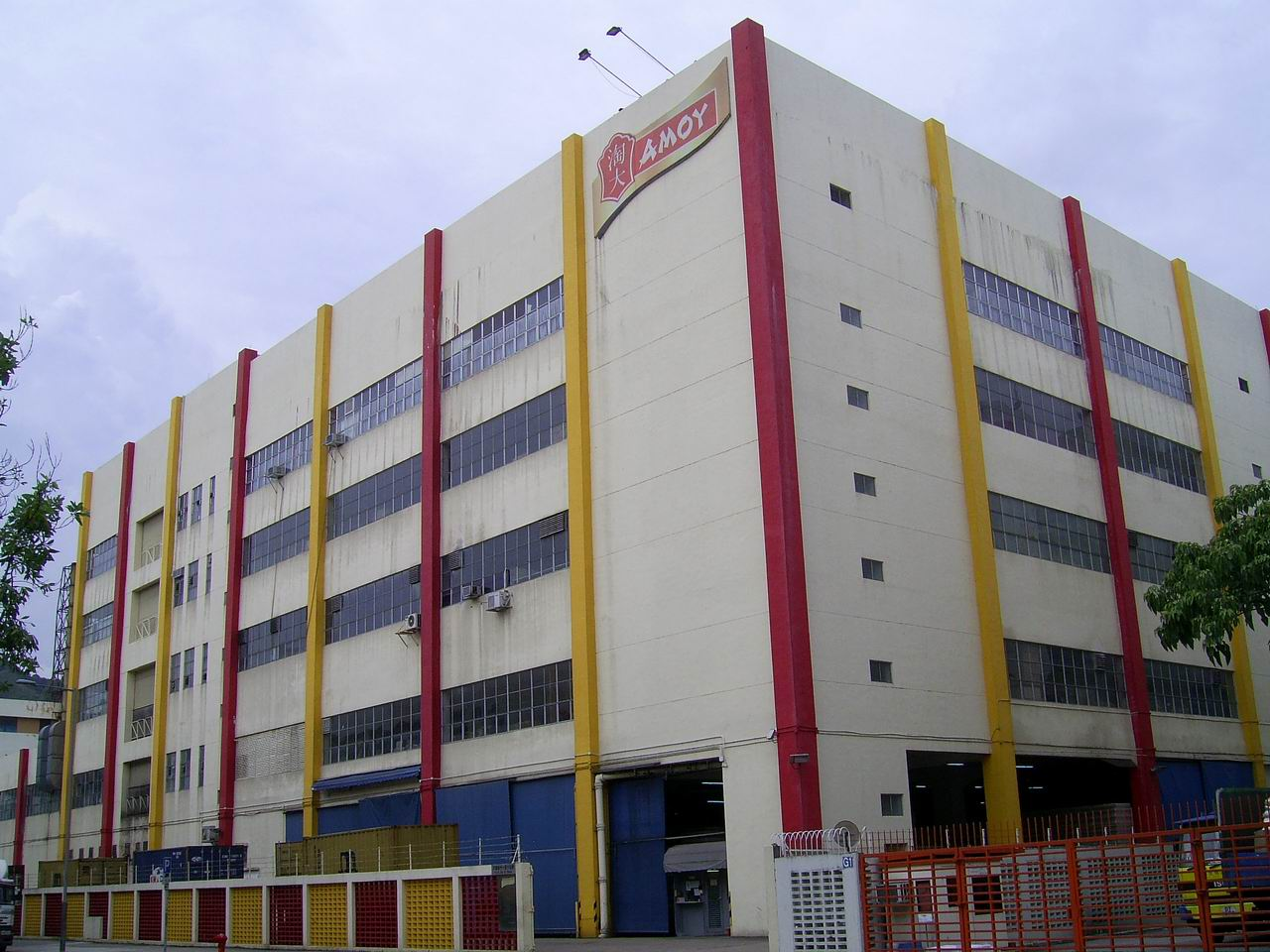 中文（香港）: 大埔工業園淘化大同食品